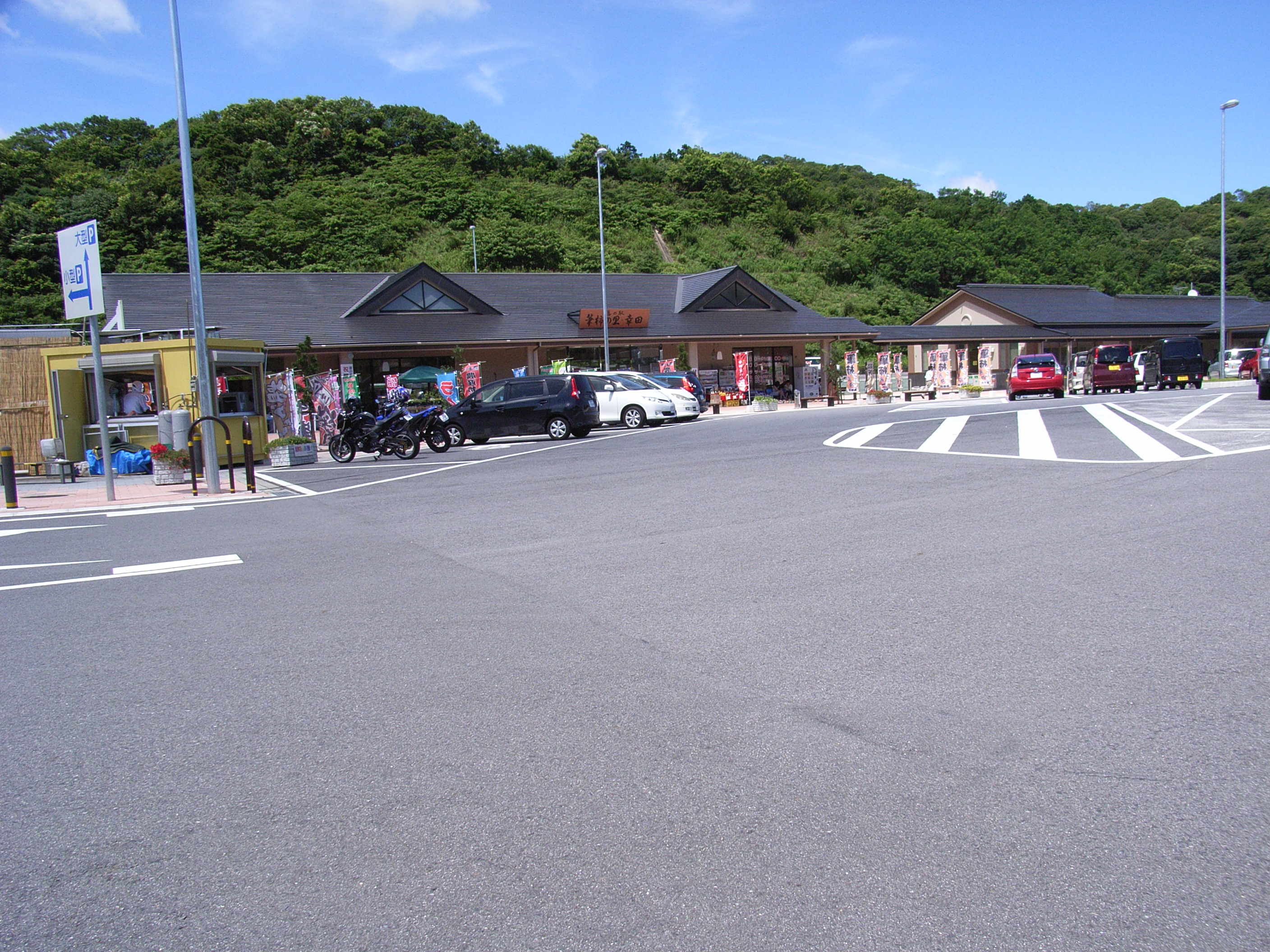 道の駅筆柿の里・幸田。愛知県額田郡幸田町。